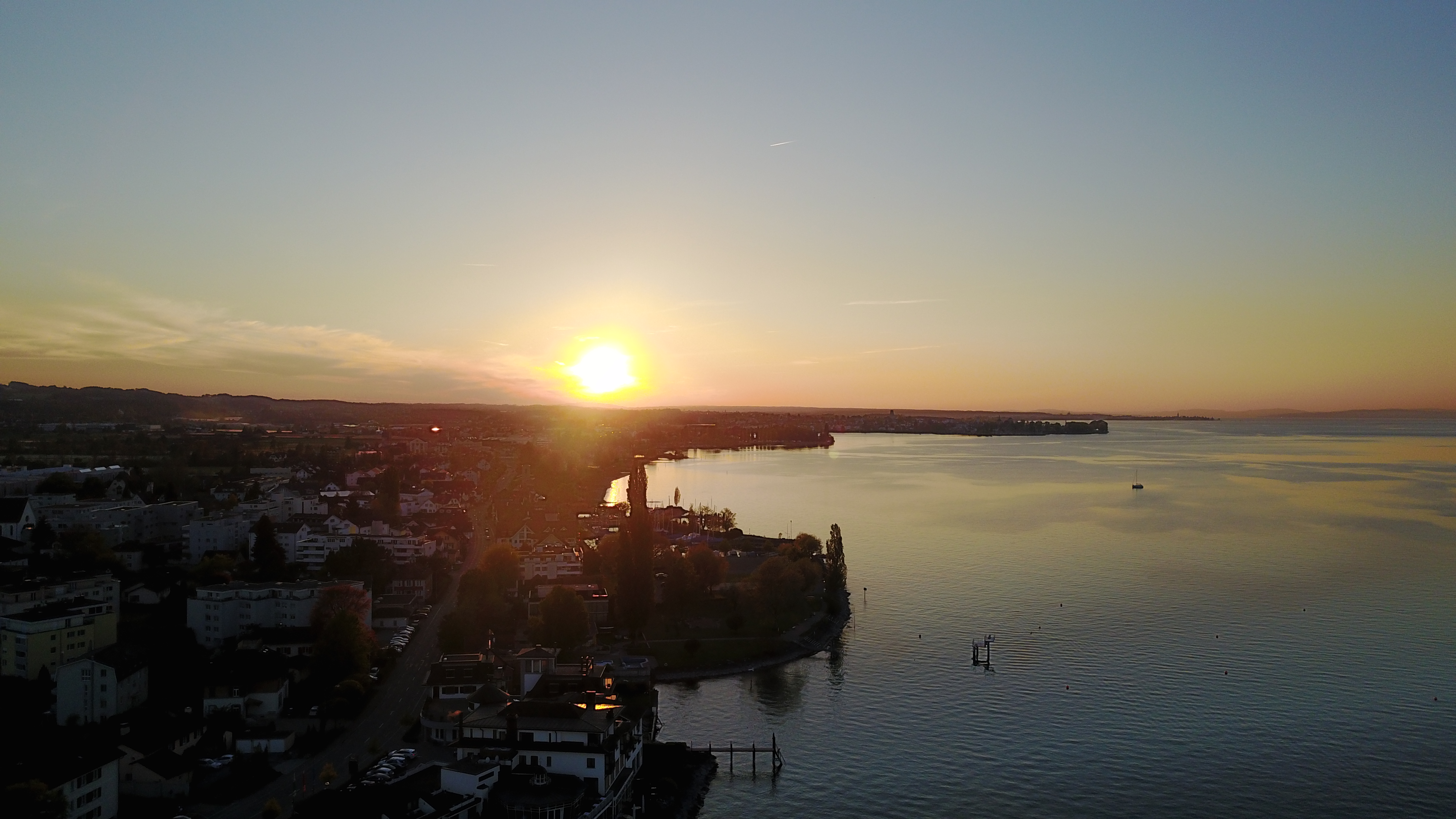 Luftbild der Horner Strandpromenade bei Sonnenuntergang